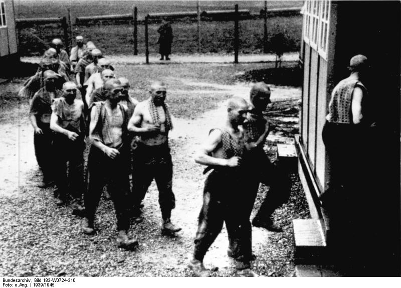 Polnische Zwangsarbeiter ADN-ZB-CAF II. Weltkrieg 1939-45 In einem Lager für zur Zwangsarbeit verschleppte Polen in Deutschland [Polnische Zwangsarbeiter mit freiem Oberkörper (auf Weg zum Waschraum ?)]